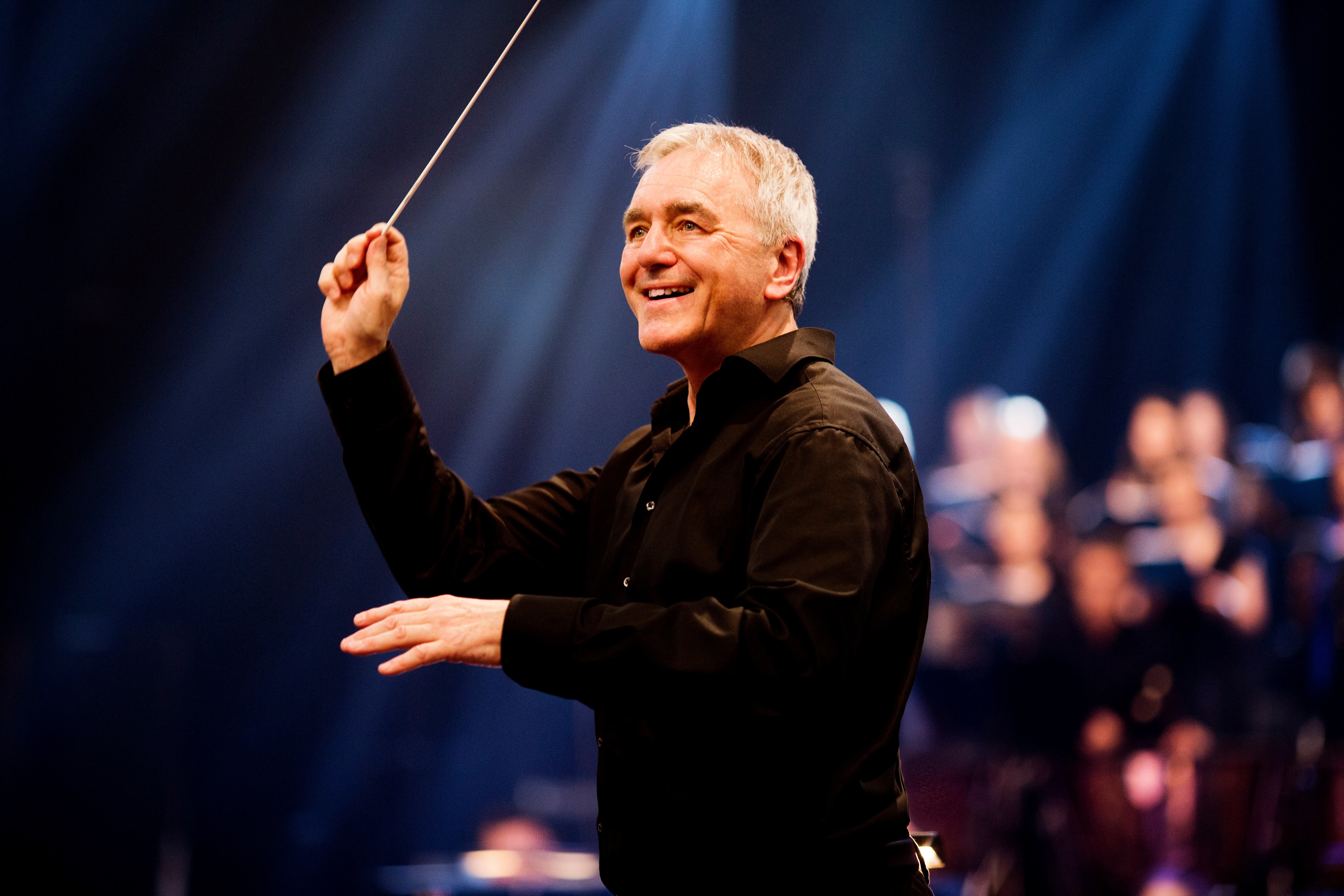 Arman Howard dirigiert den Chor des Bayerischen Rundfunks